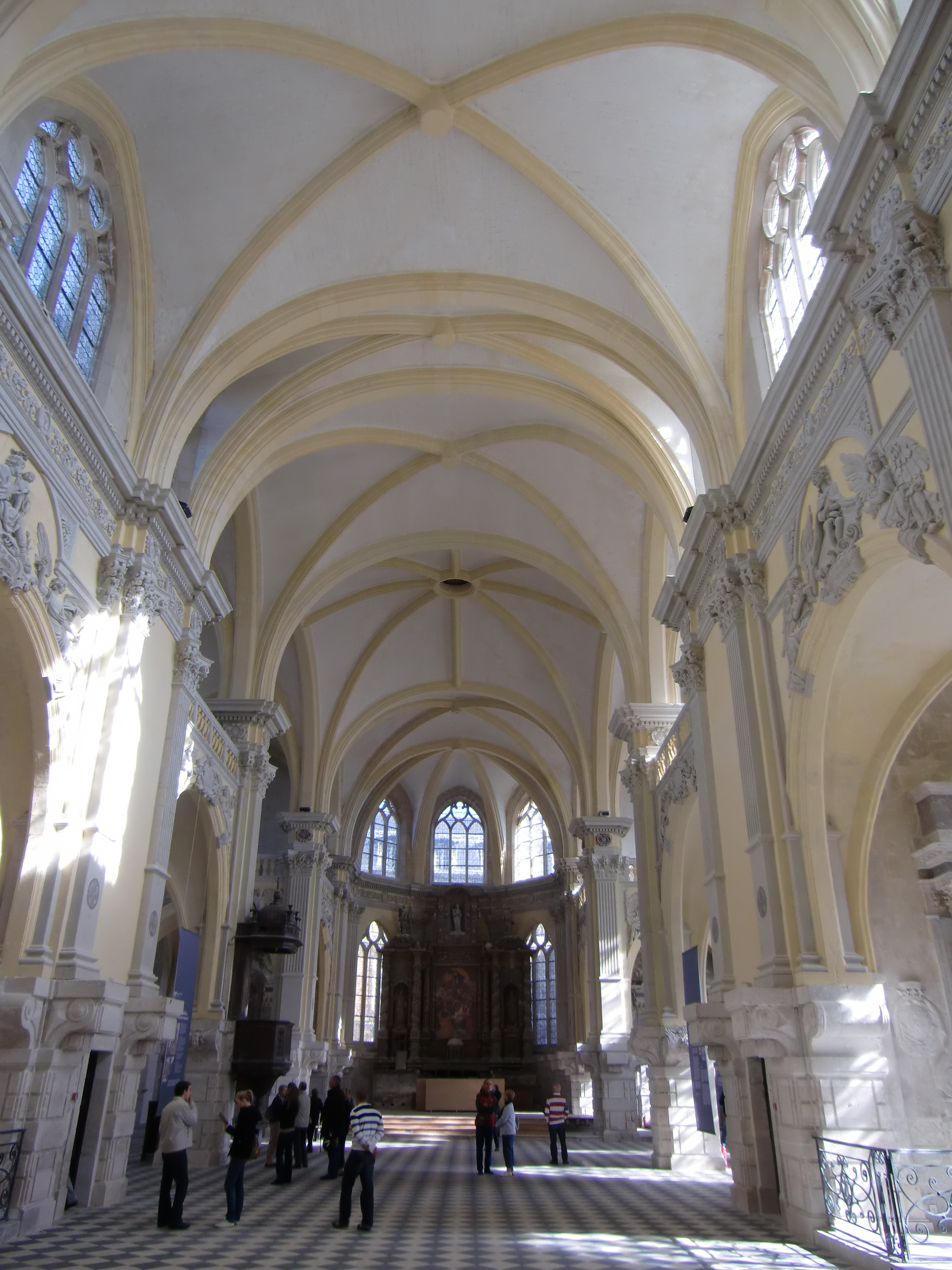 Nef de la chapelle du Lycée Corneille à Rouen (Normandie, France)